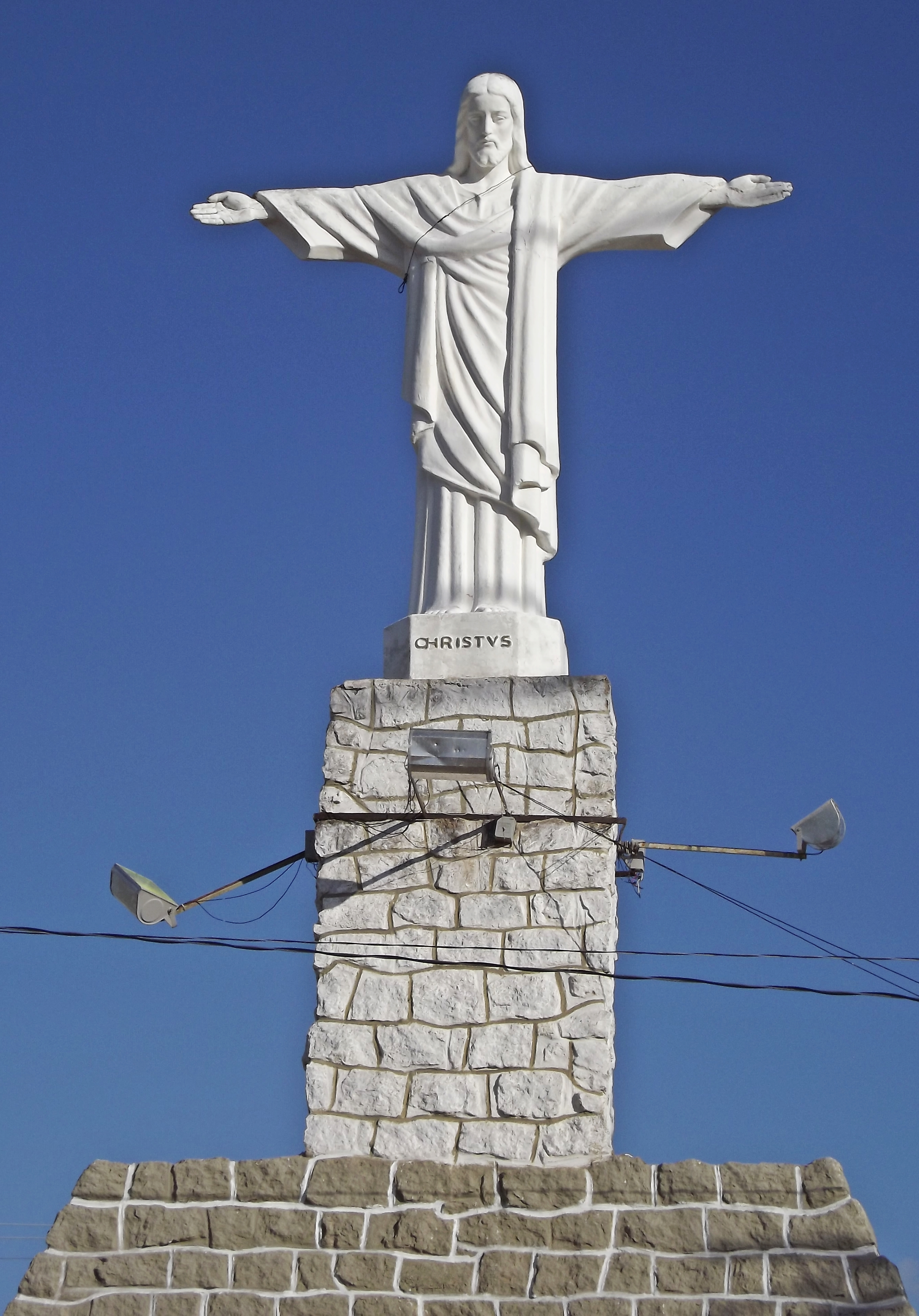 Estátua do Cristo Redentor, situada no morro de mesmo nome, no município de Cajazeiras, estado da Paraíba, Brasil.